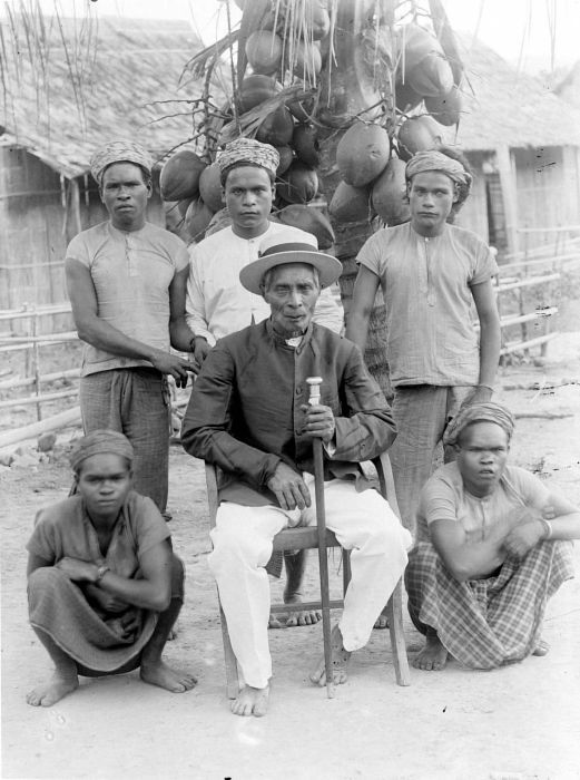 Negatief. Zoals het grote, dunbevolkte Halmahera werd overschaduwd door de eilandjes Ternate en Tidore, zo stonden de reuzen Boeroe en Ceram in de schaduw van Ambon. Waar Halmahera in 1920 nog 4 inwoners per vierkante kilometer telde, was dat voor Boeroe slechts anderhalf. De bevolking was toen nog grotendeels 'heiden', de tweede groep werd door de islamieten gevormd, terwijl de groep christenen de kleinste was. Er werd kajoepoetih-olie op het eiland gestookt voor de handel. Verder leefde de bevolking van de jacht, het zoeken van sago, de teelt van wortels en knollen en de verbouw van rijst en gierst op ladangs. De 'regent' op de foto heeft een stok in zijn hand met een witte (ivoren?) knop, waarop het wapen van het gouvernement staat. (P. Boomgaard, 2001). De ruim zeventig jaar oude regent van de Waèno-stam (Buru) met enkele bewoners van het merengebied, hier in vol ornaat. Zijn stok met het wapen van het Nederlandse gouvernement op de knop symboliseerd zijn gewaardeerde inzet voor het bestuur en zending